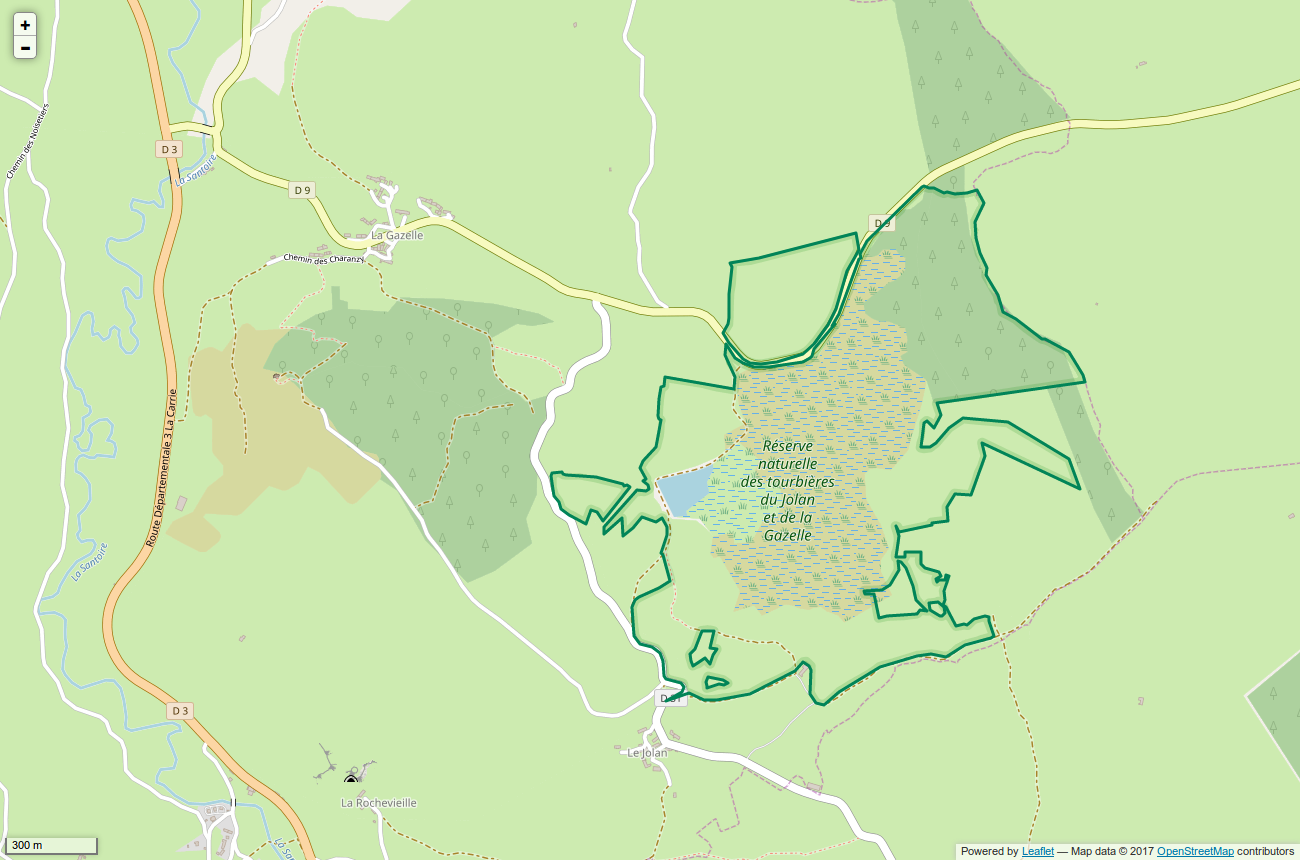 Périmètre de la RNR des tourbières du Jolan et de la Gazelle.